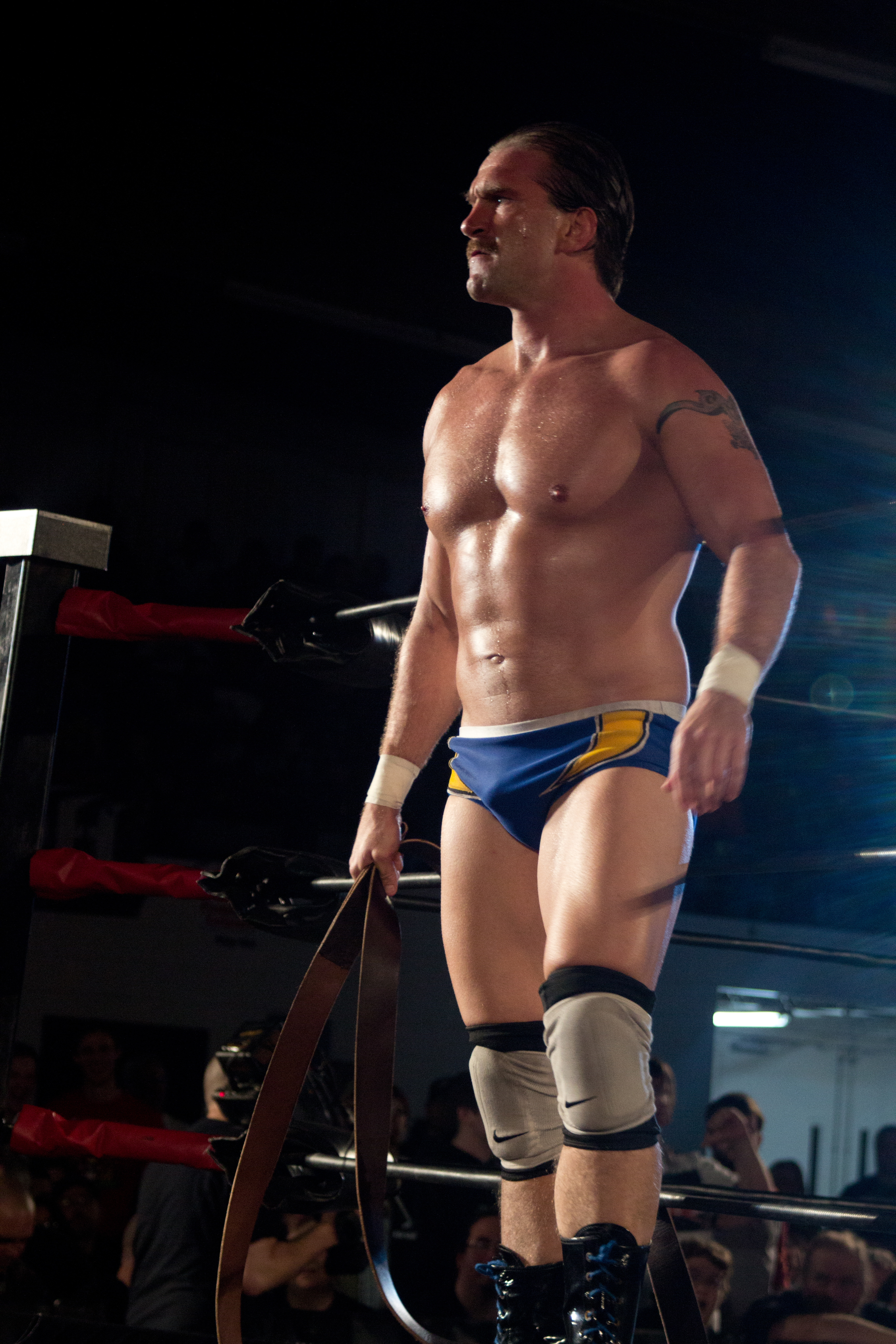 Silas Young dans un show de la ROH en janvier 2014